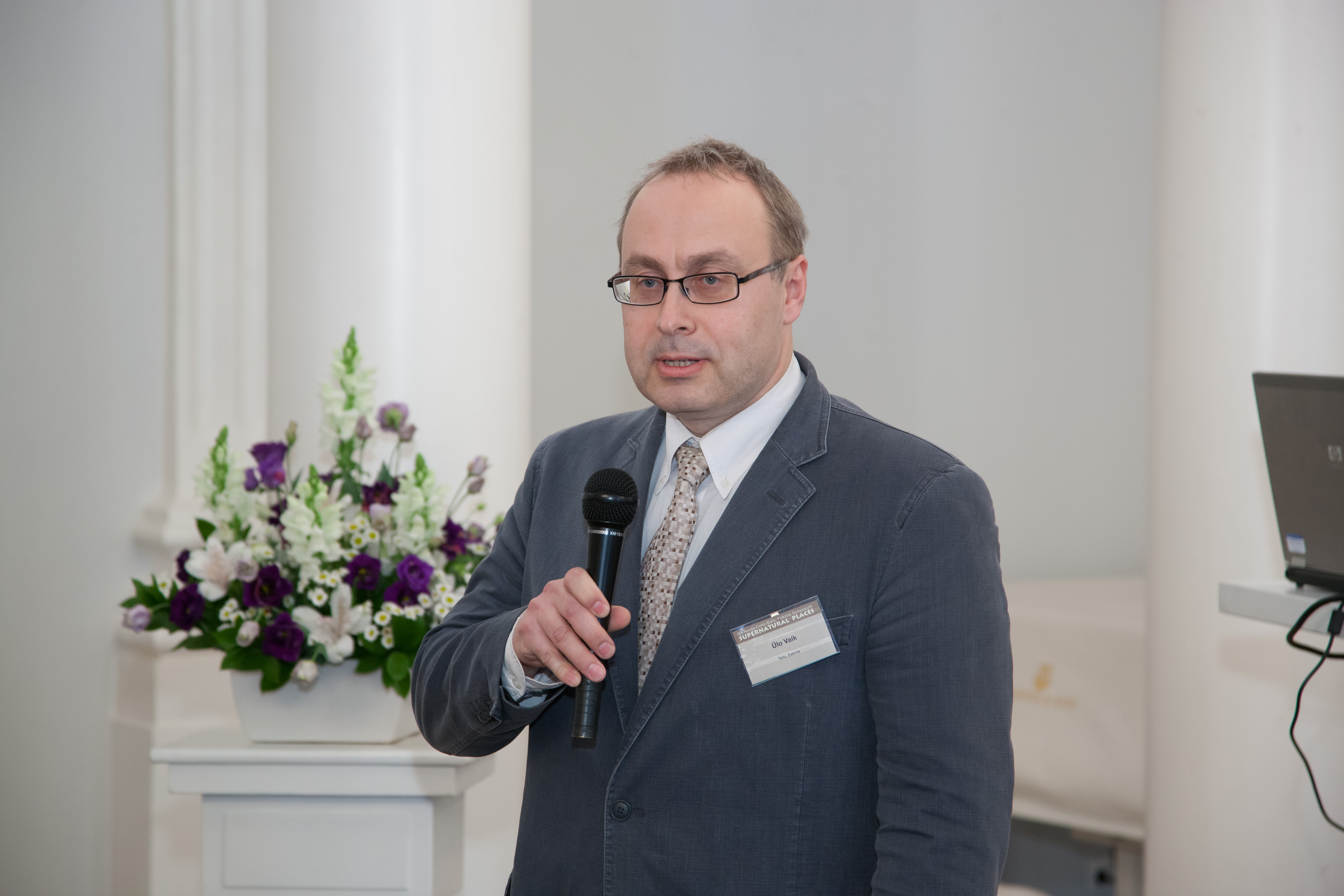 TÜ eesti ja võrdleva rahvaluule professor Ülo Valk Tartus toimunud rahvusvahelisel muistendi-uurijate sümpoosionil "Supernatural Places" (4.-7. juuni 2012). Avamine ja plenaarettekanne TÜ aulas 4. juunil.